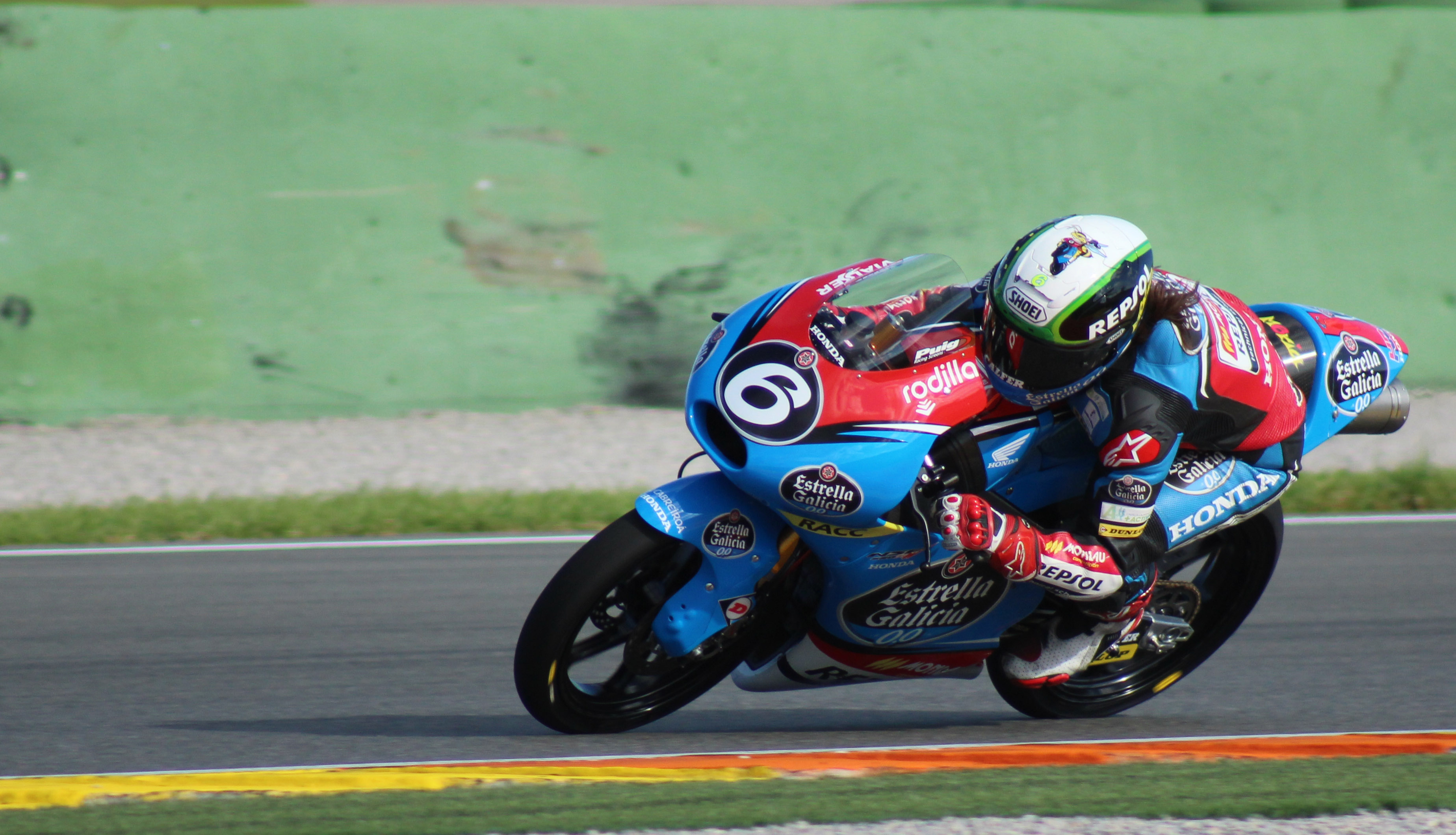 María Herrera rodando en los FP3 en la jornada matinal del Sábado del GP de Valencia del CEV de Moto3 de 2014